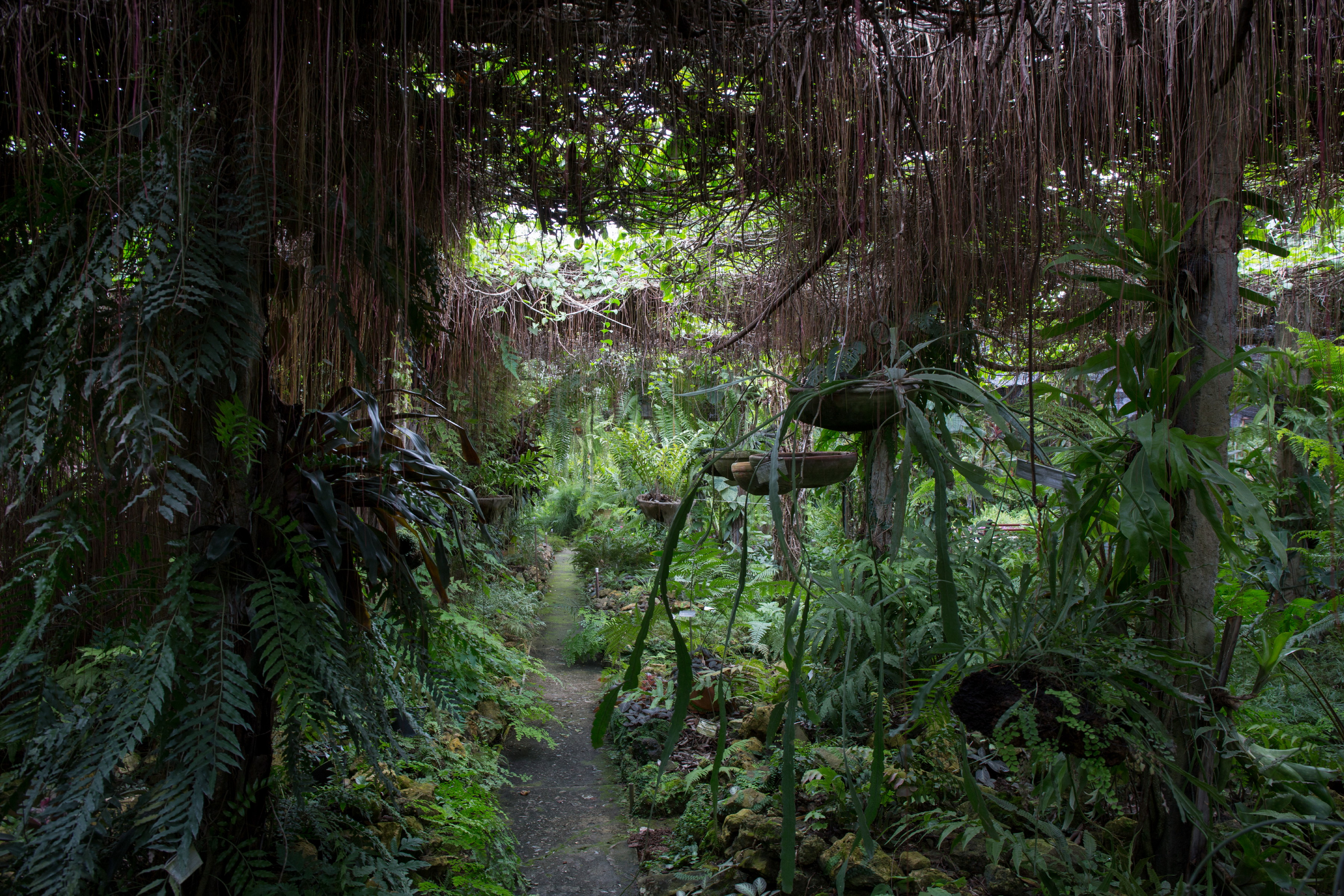 Jardin de los helechos, carretera Caney, Santiago de Cuba. Besuchenswerter Garten, auf Farne spezialisiert.